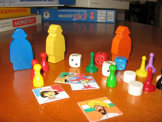 Spielsteine für Brettspiele